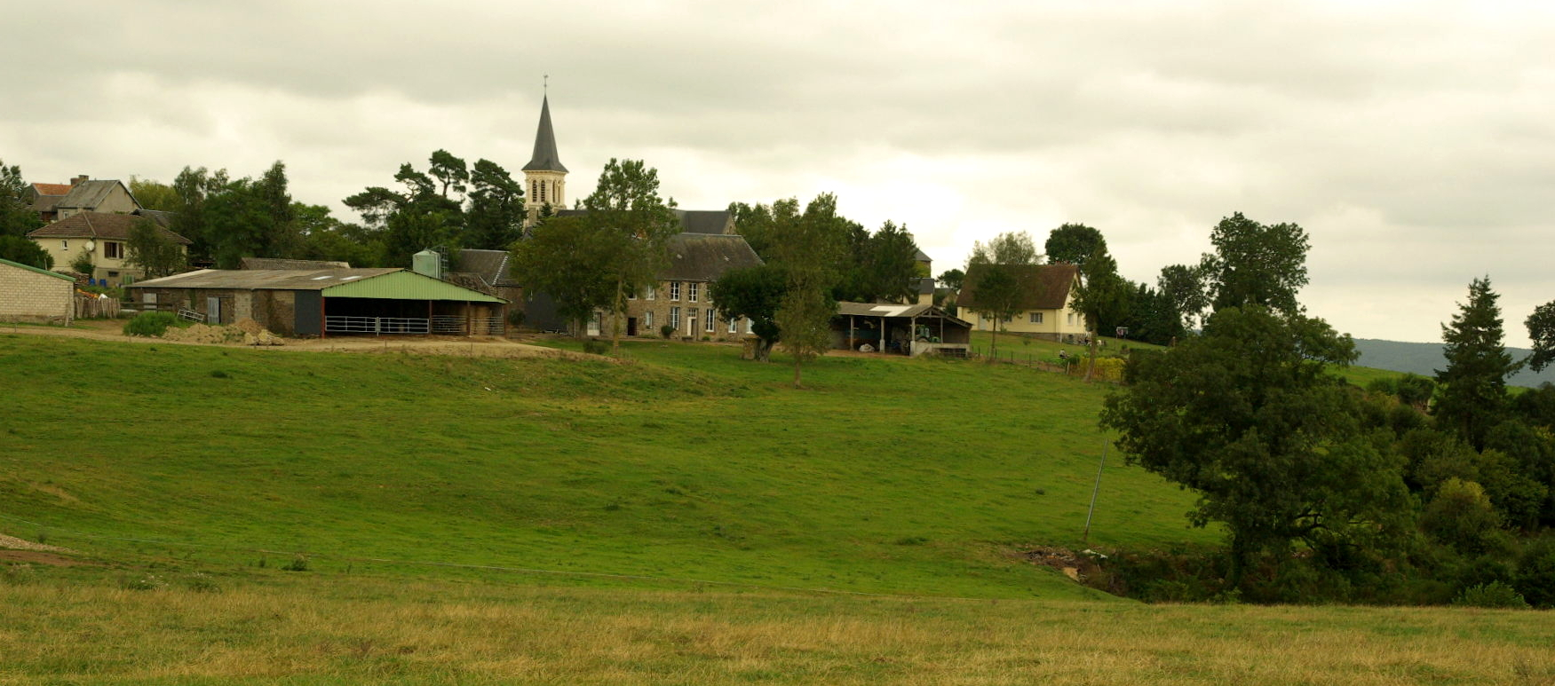 Une vue du village de La Villette, Calvados.